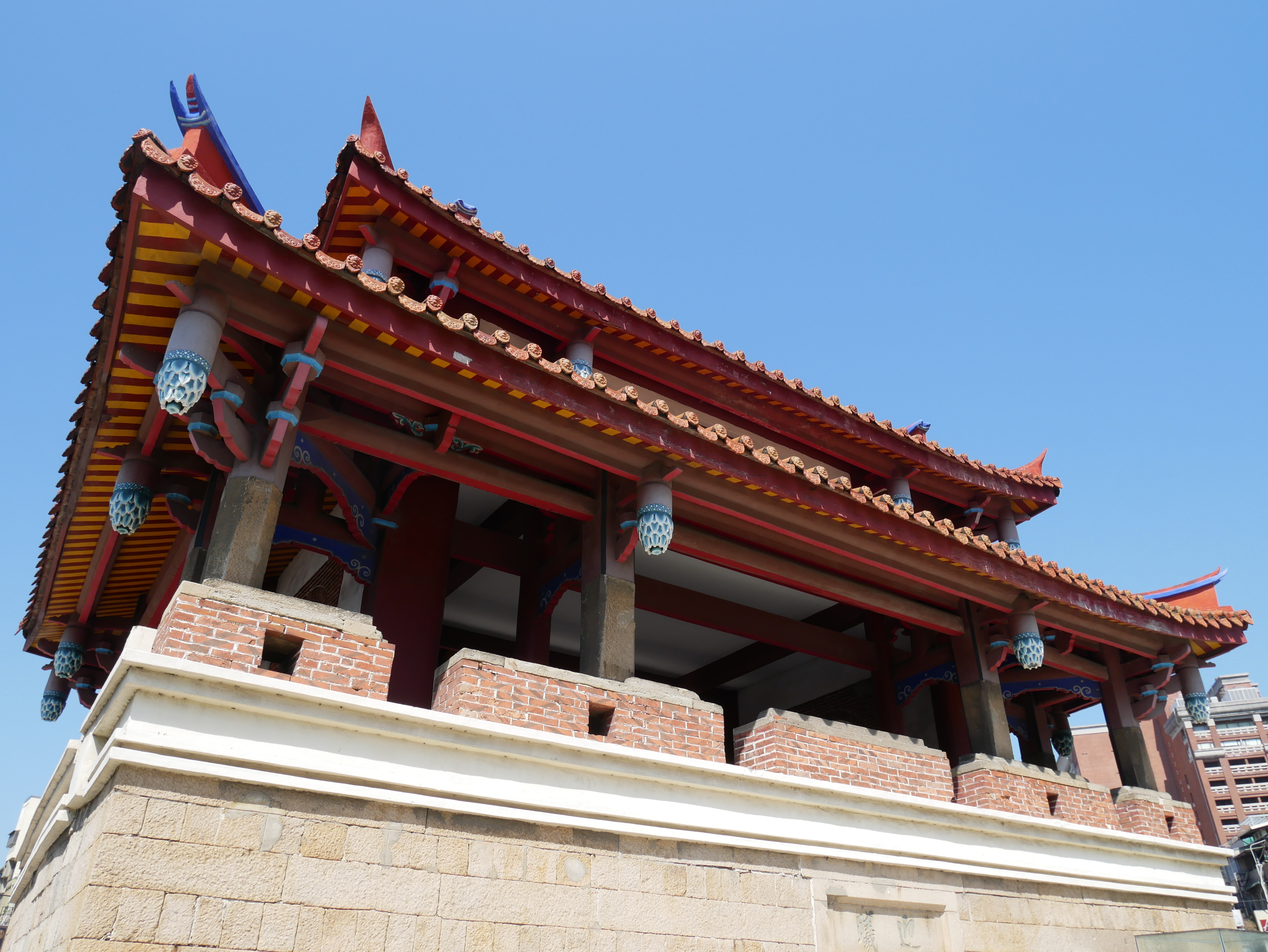 竹塹城迎曦門城樓，新竹市東區東門聯里中正里